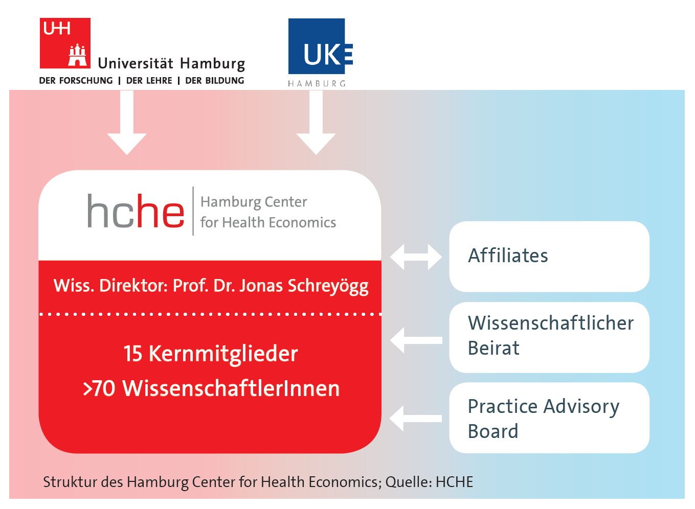 Struktur des Hamburg Center for Health Economics